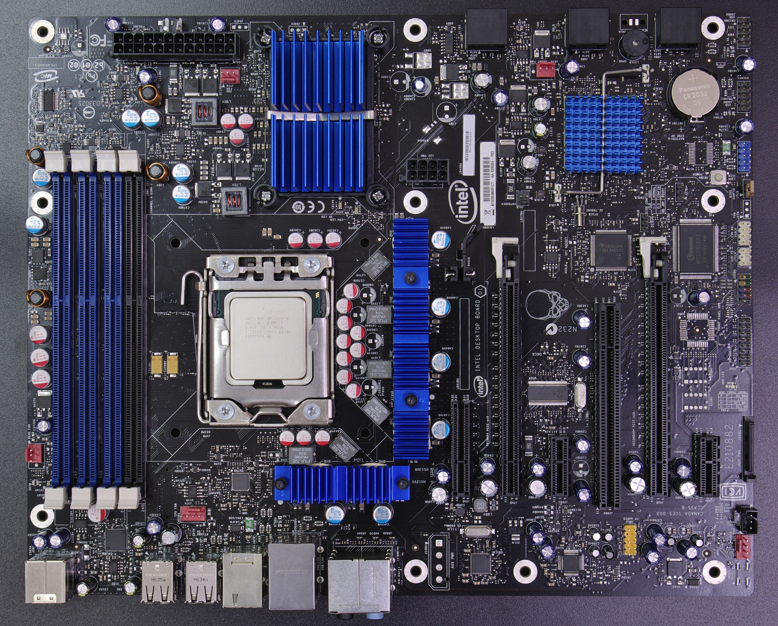 Intel Mainboard DX58SO mit montiertem Prozessor.